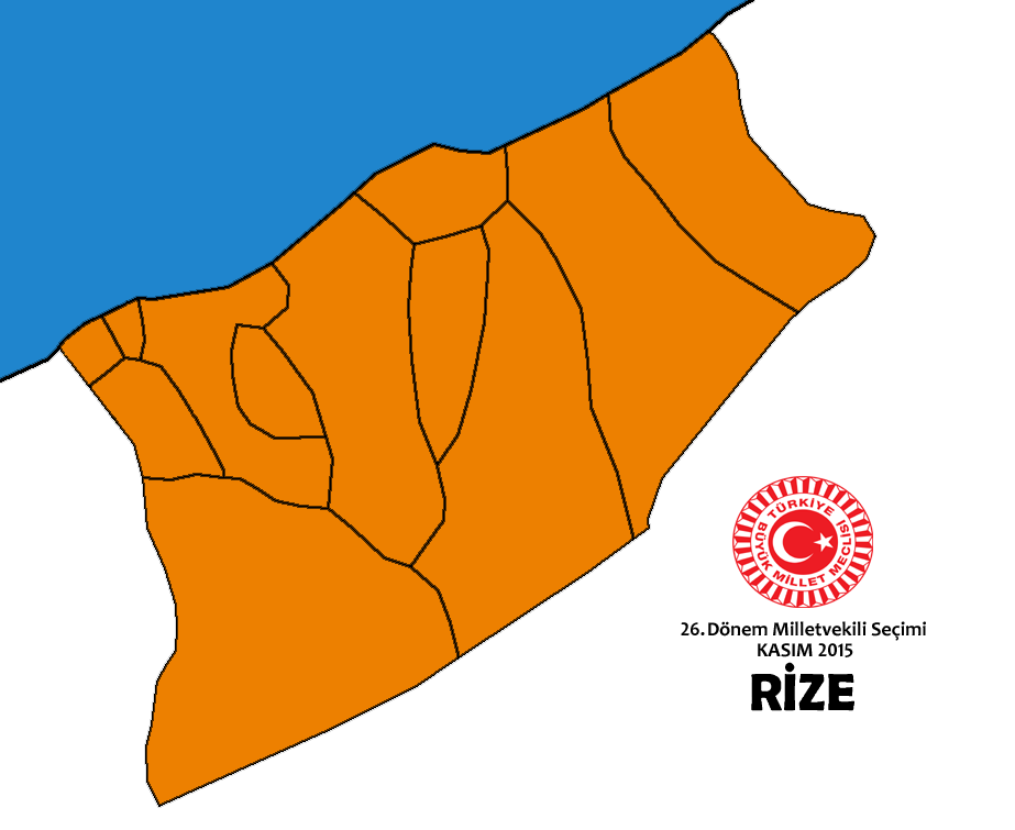 Kasım 2015 Seçimleri